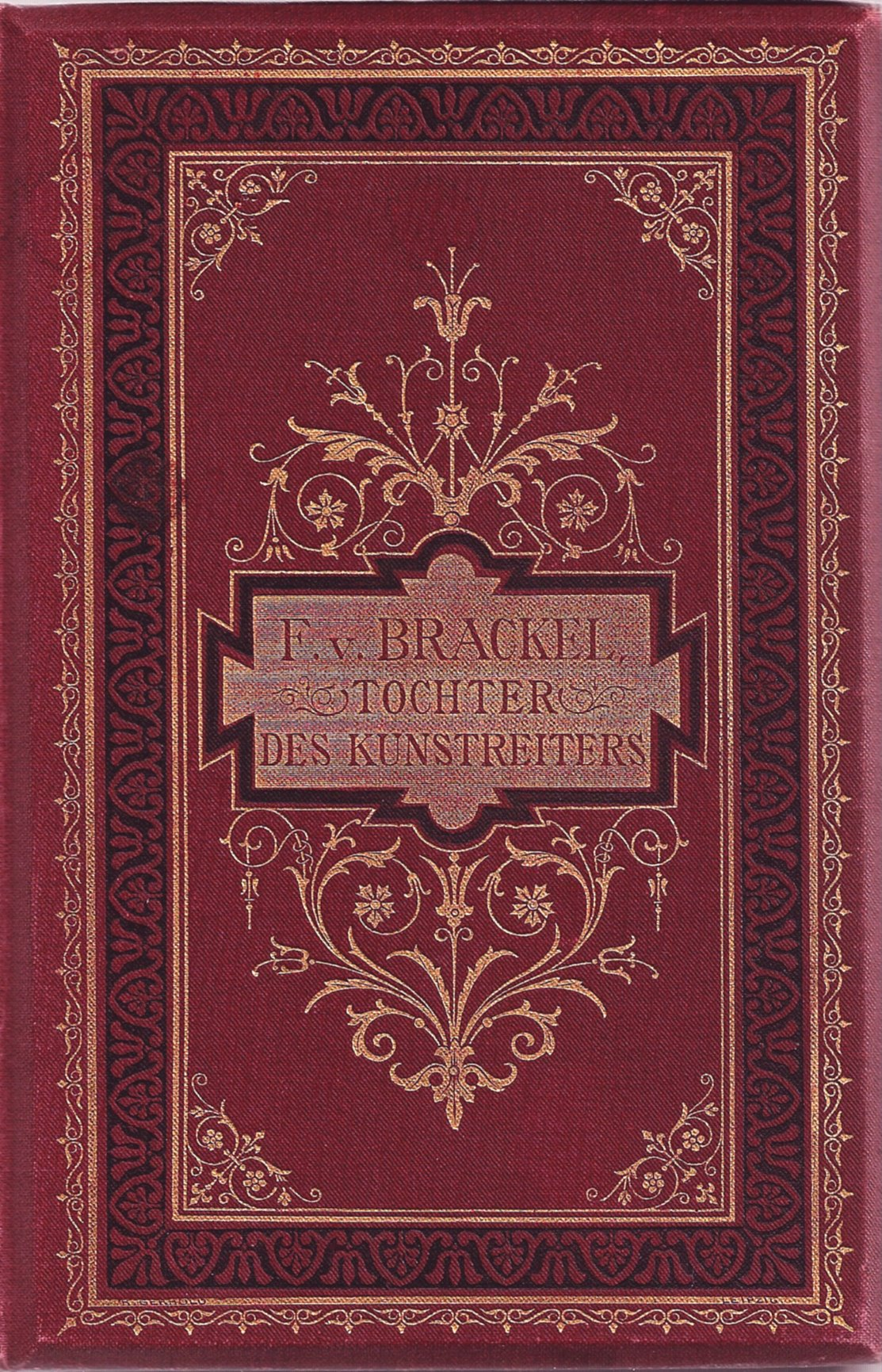 Cover of "Die Tochter des Kunstreiters" from Ferdinande von Brackel (1835-1905)